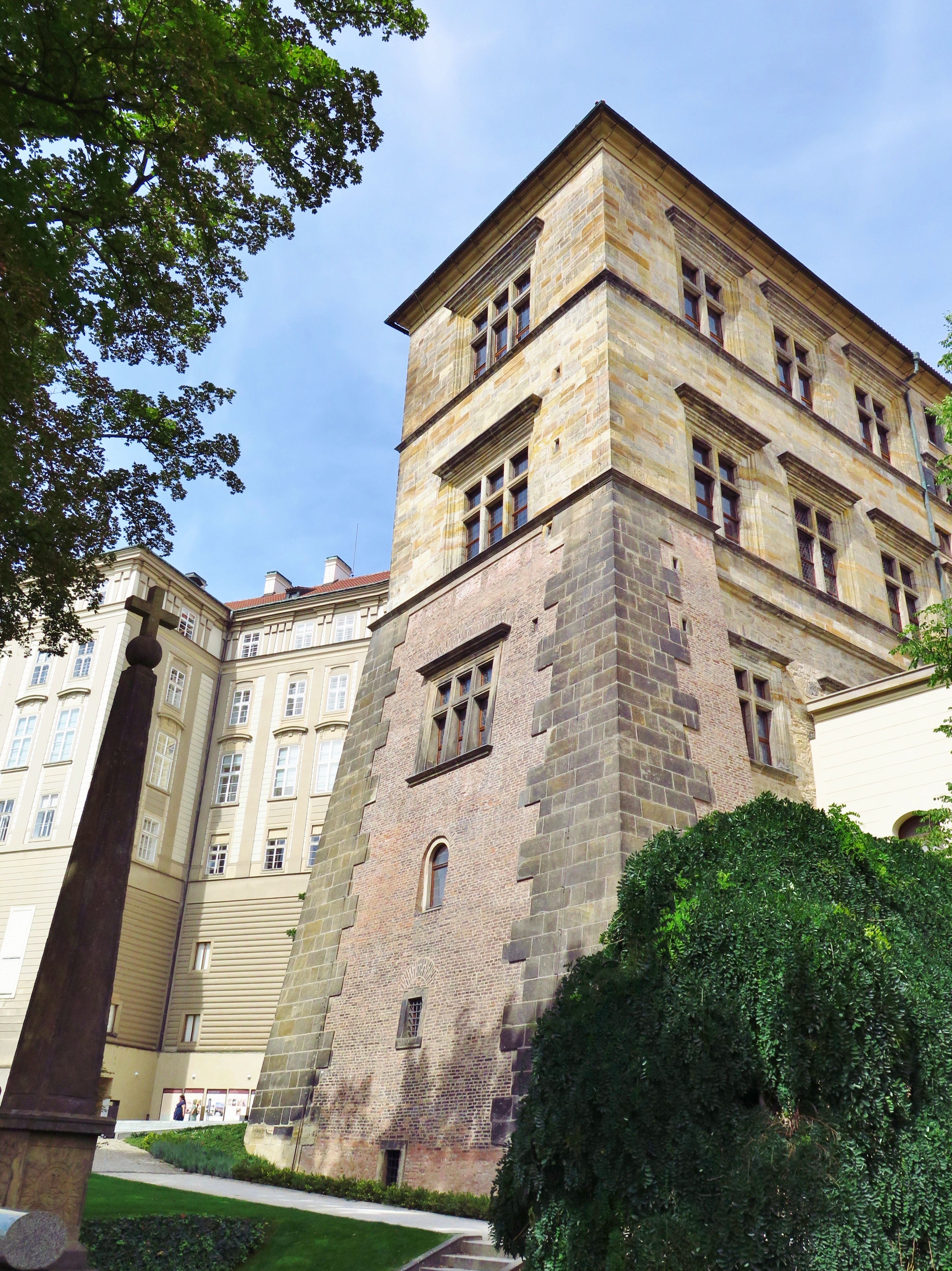 Башня на южной стороне Старого королевского дворца (Пражский Град), в которой развернулись события второй пражской дефенестрации (1618 г.)